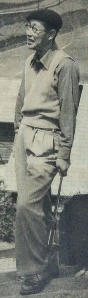 水谷準